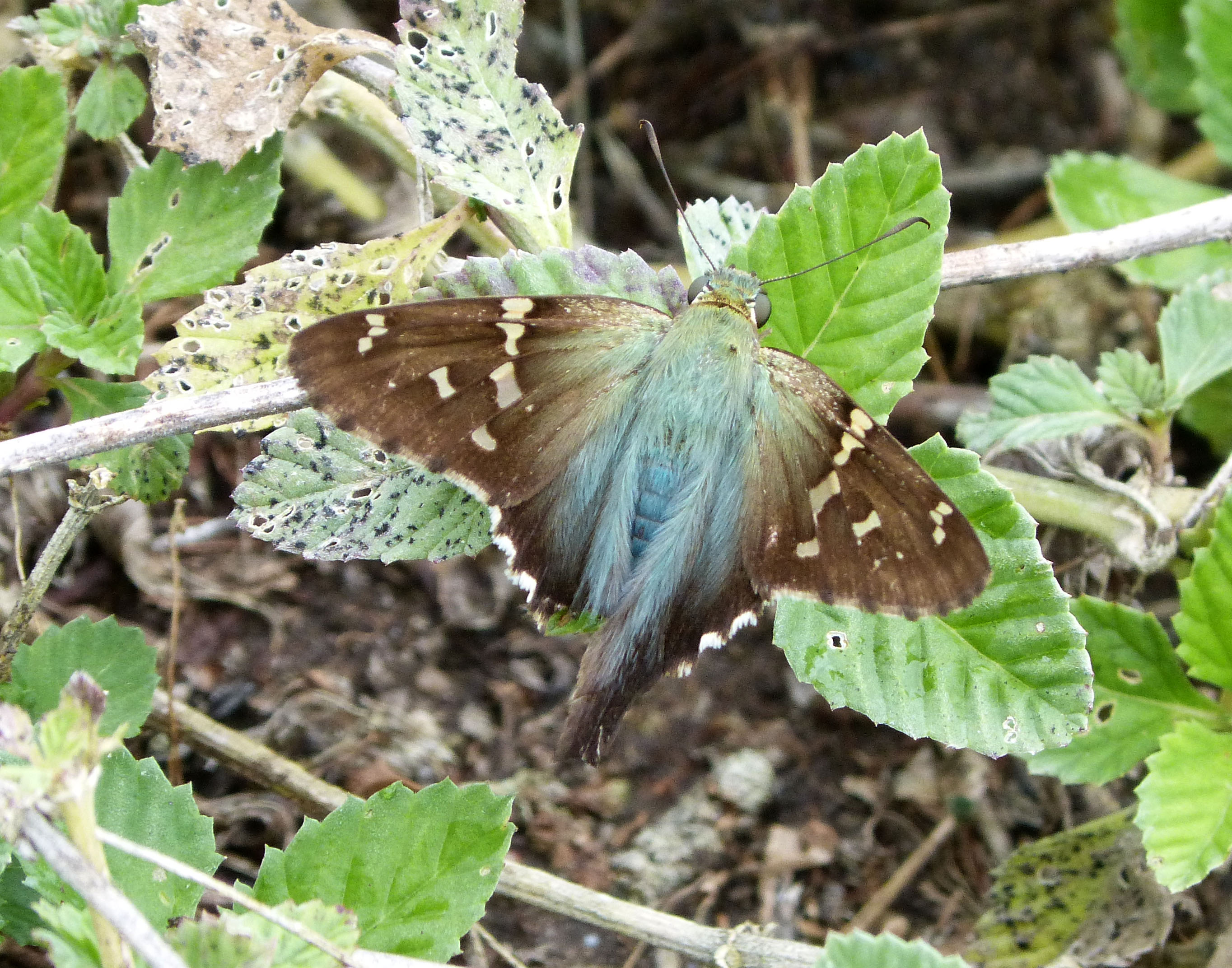 La Belen, Sierra de Najasa, Cuba